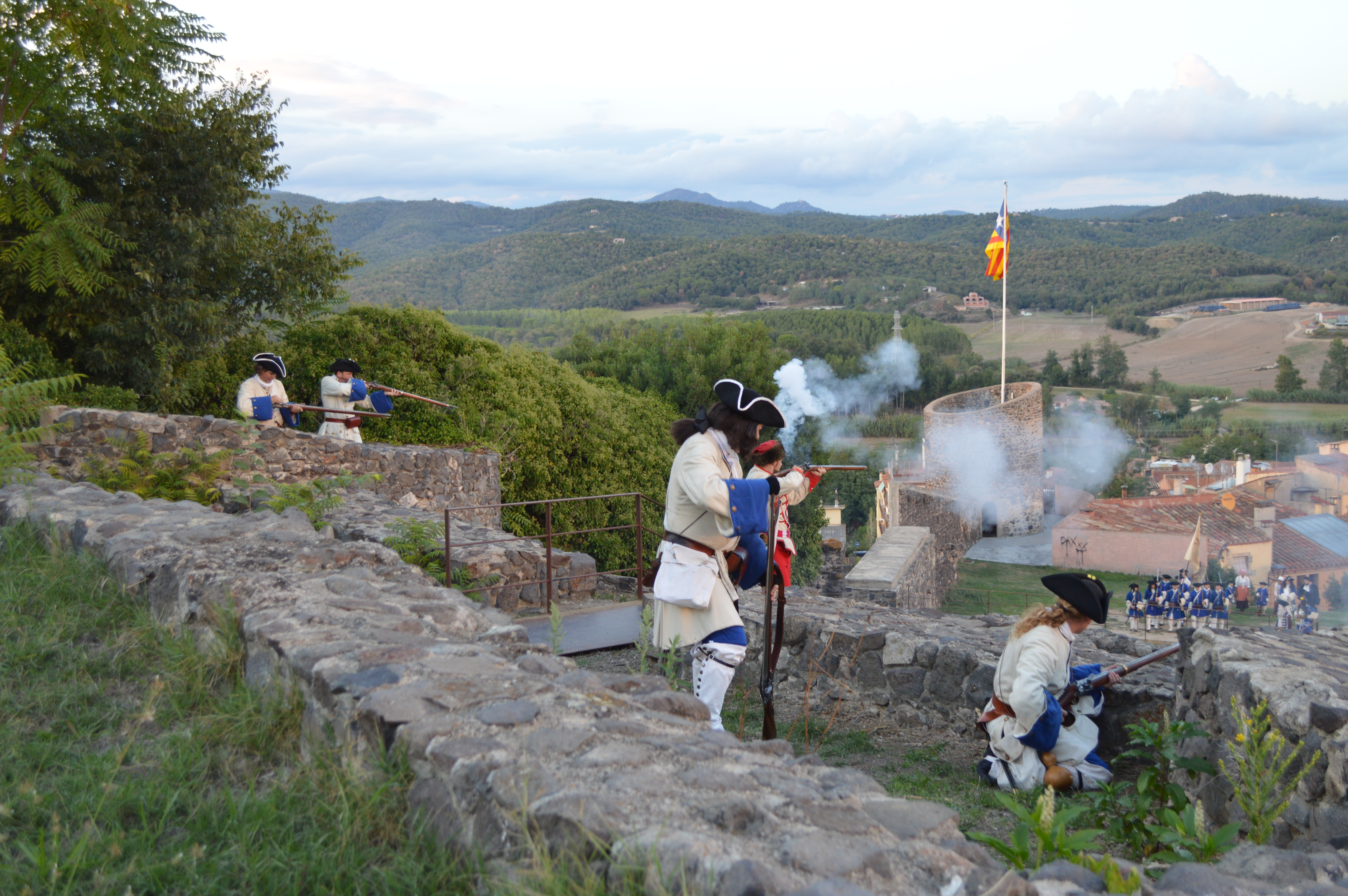 Miquelets de Girona – Regiment de Sant Narcís. El dissabte, faran la III recreació històrica Hostalric, Baluard Austriacista. La plaça d'Hostalric va ser una fortificació important de Carles III i l'Aliança. Un dels objectius de l'Expedició del Diputat Militar era evitar la seva caiguda a mans borbòniques. La missió va fracassar i el 17 d'agost es lliurava la plaça al borbònic Francesco Marulli; mentre l'expedició es dirigia cap a Arbúcies.